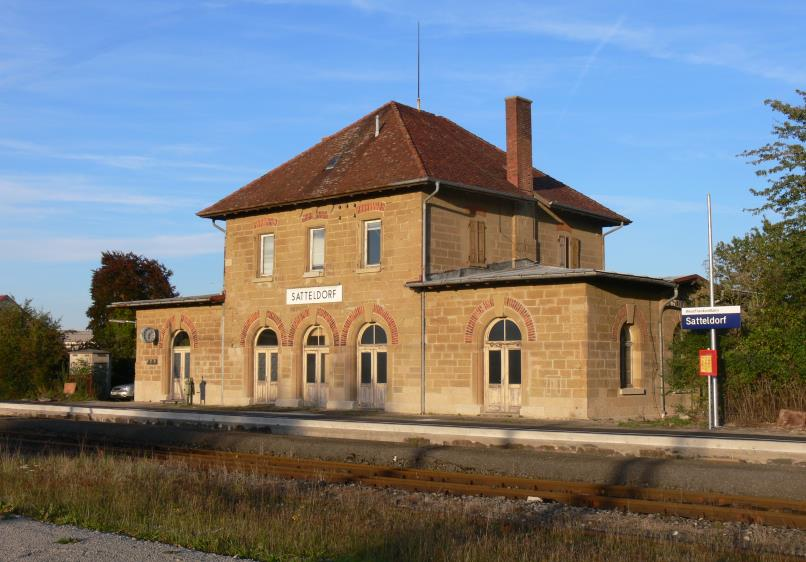 Reaktivierter Haltepunkt Satteldorf